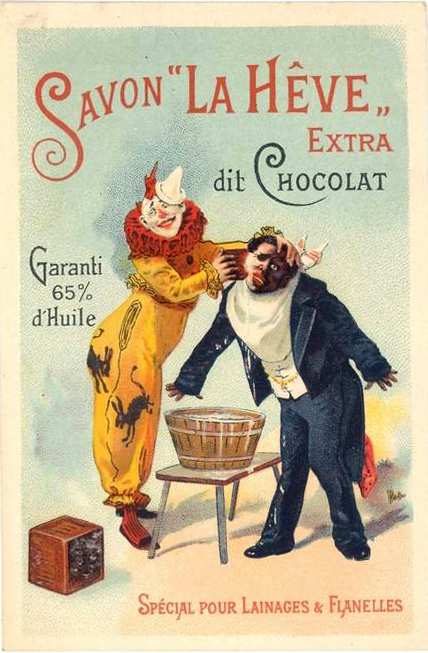 Chromolithographie représentant les clowns Footit et Chocolat. 8 x 12 cm.